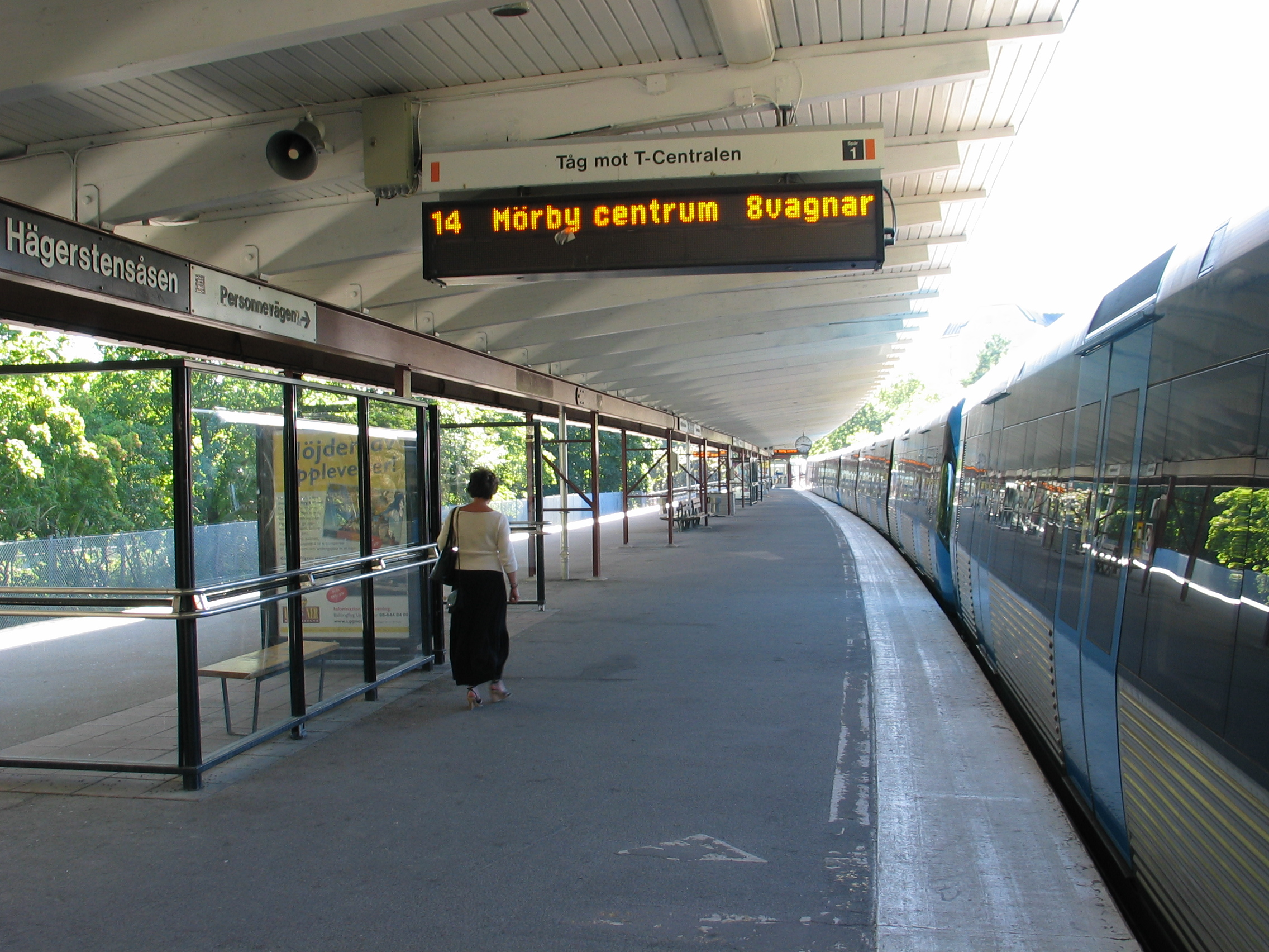 Hägerstensåsen, a metro station in Stockholm, Sweden.